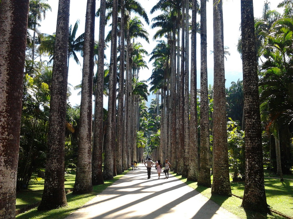 Aleia Barbosa Rodrigues, no Jardim Botânico do Rio de Janeiro - Brasil